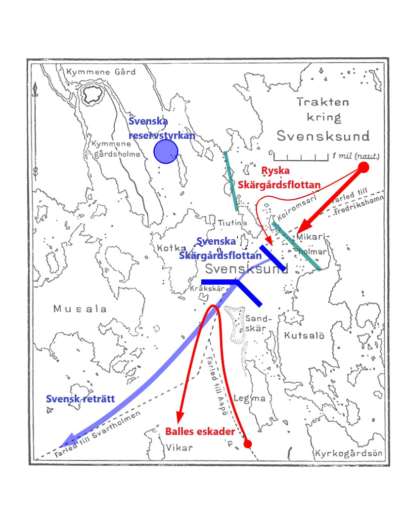 Map over the battle of Svenssund 1789